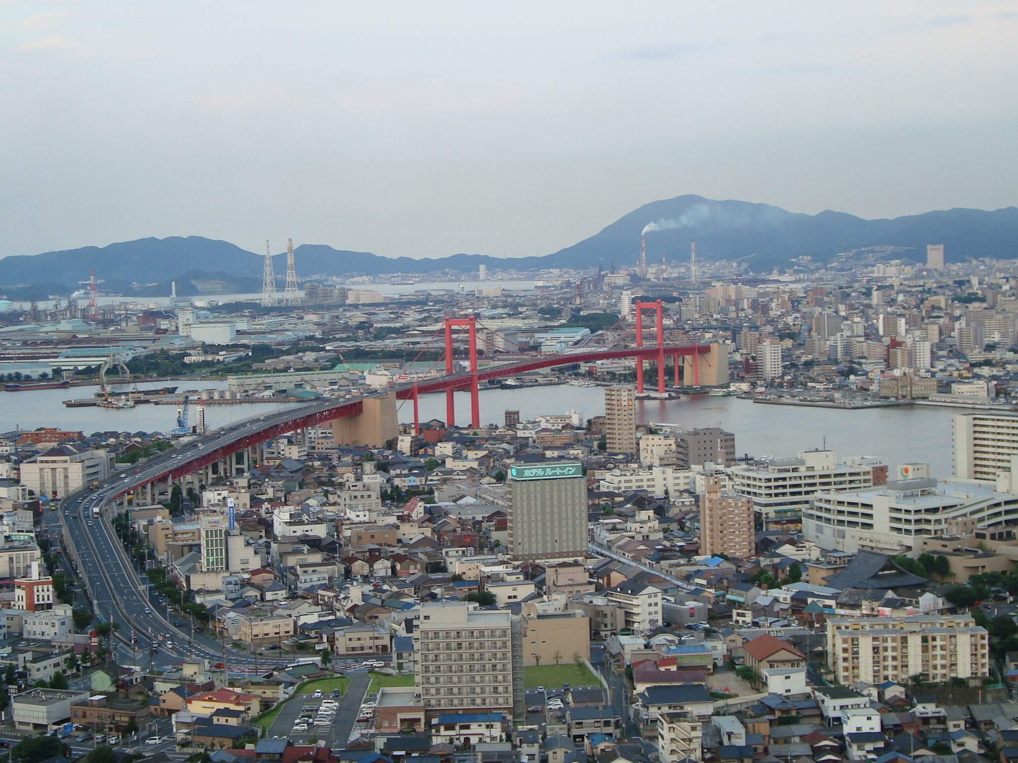 20180315 若戸大橋